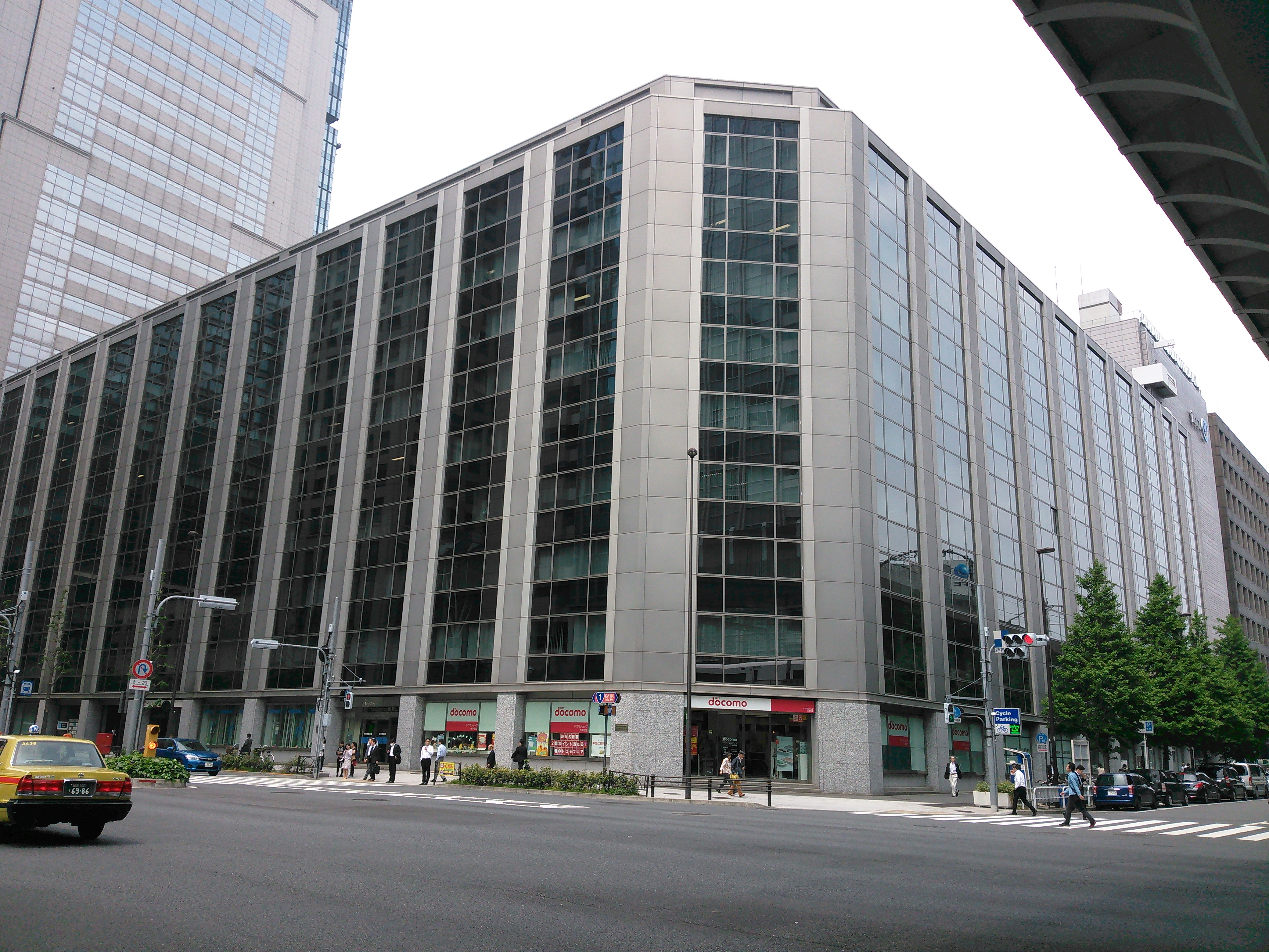 東京・大手町、新大手町ビルヂング